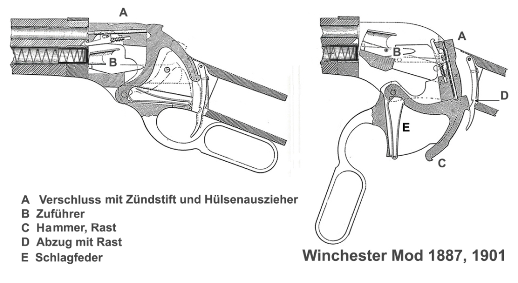 Winch M1887 Schloss